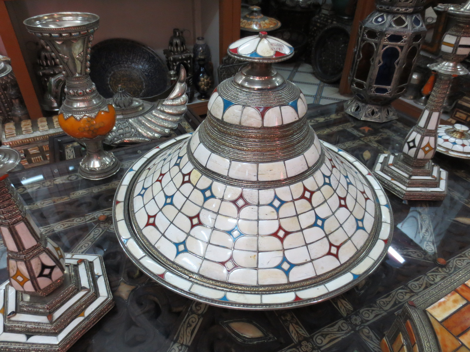 Tajine